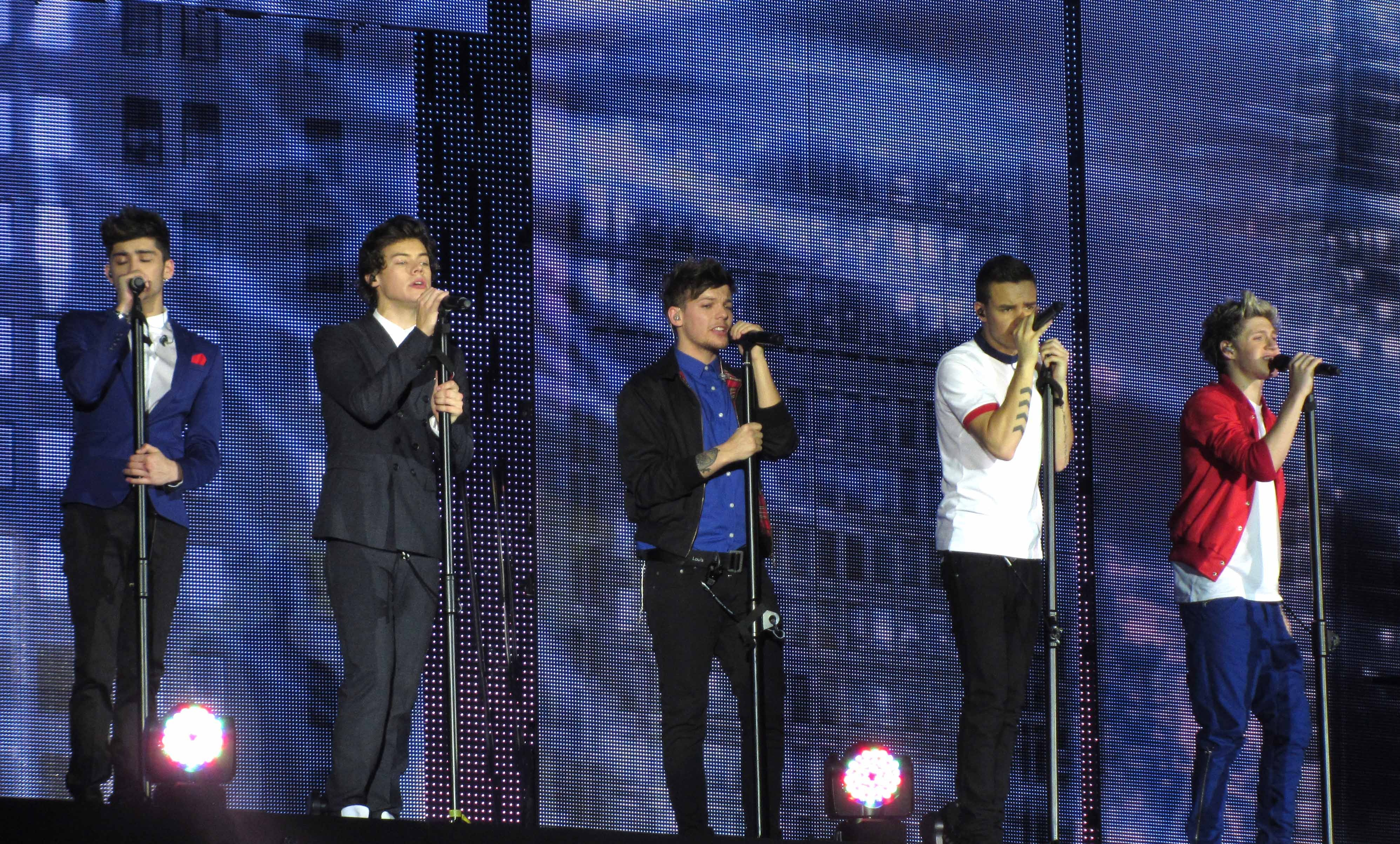 One Direction en el Take Me Home Tour de la SECC en Glasgow el 27 de febrero de 2013